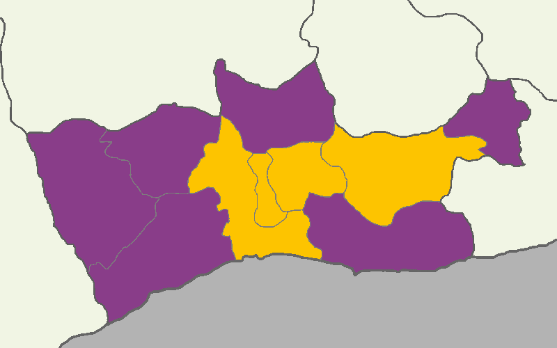 Mardin'de 2014 Türkiye cumhurbaşkanlığı seçimi